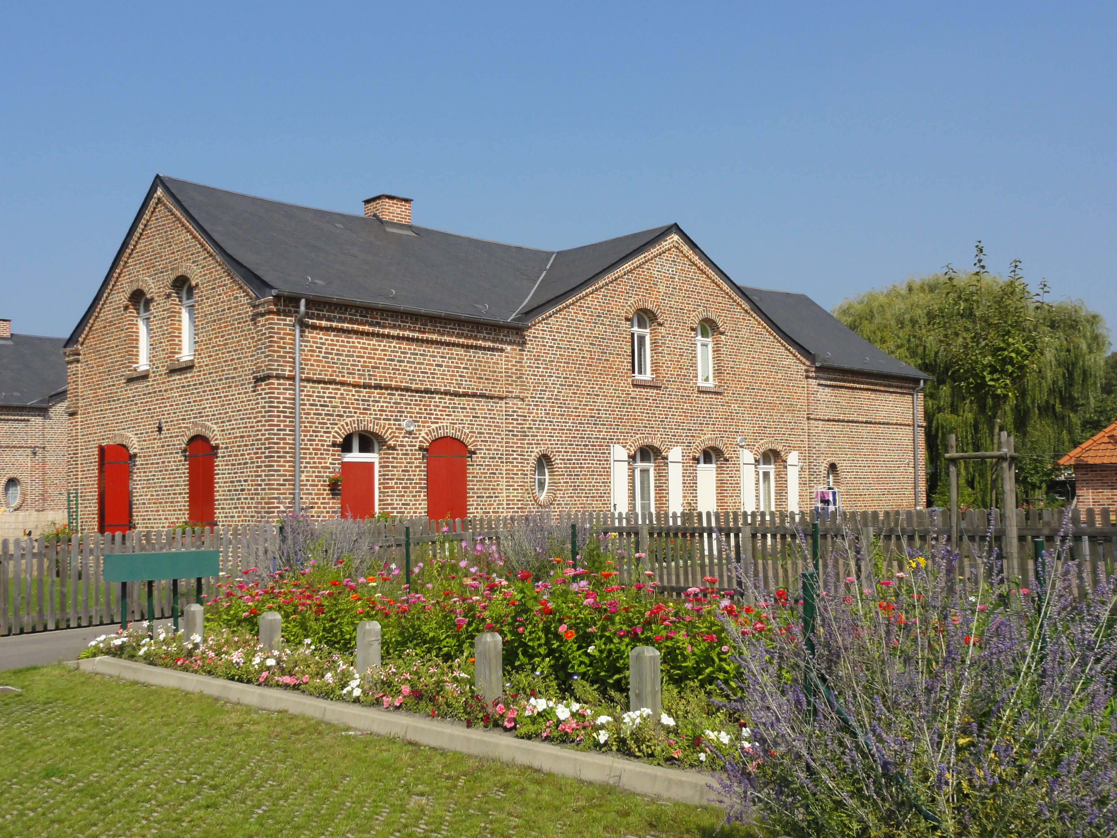 Cités des fosses Soult de la Compagnie des mines de Thivencelle, Fresnes-sur-Escaut, Nord, Nord-Pas-de-Calais, France.